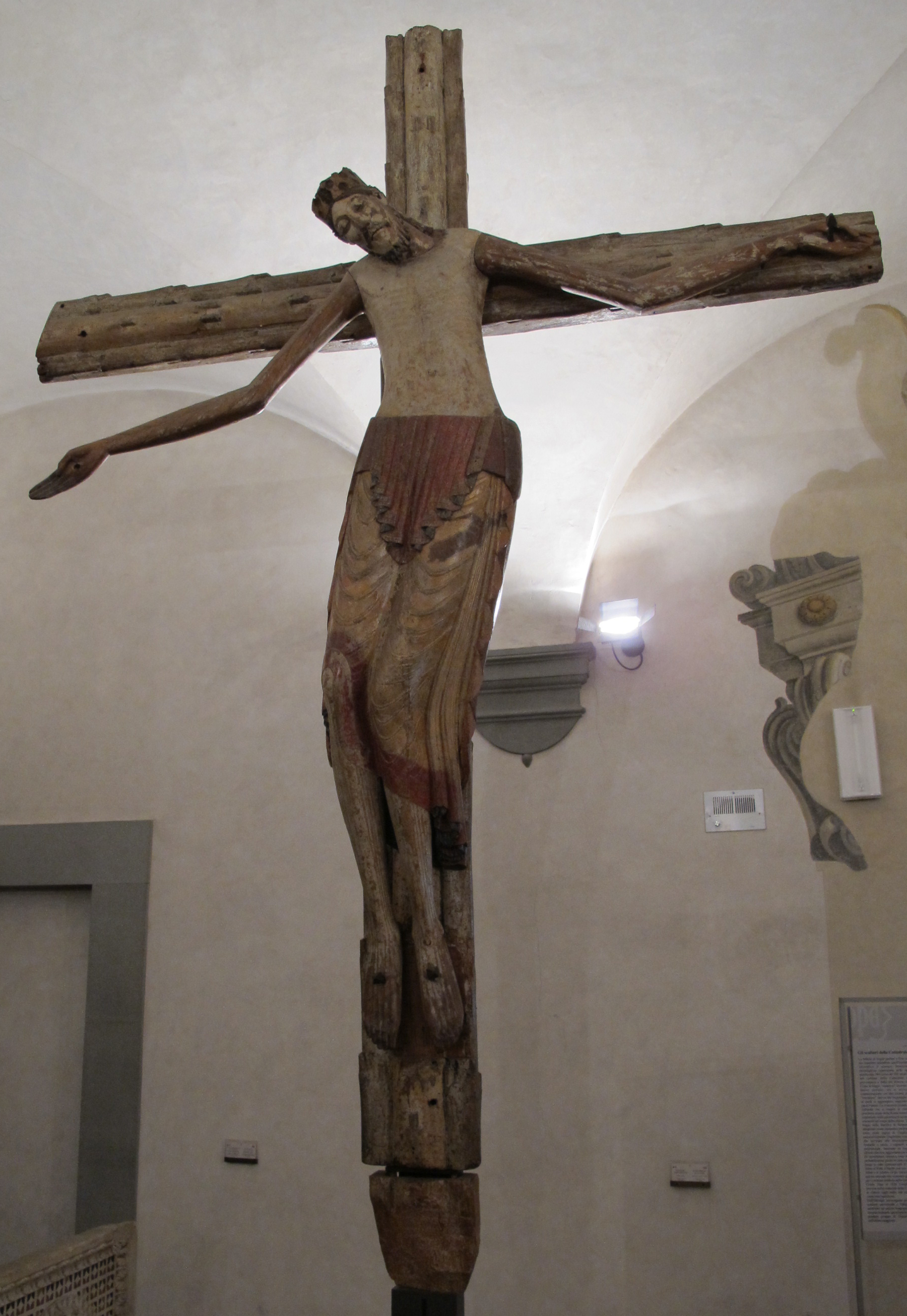 Pisa, Museo dell'Opera del Duomo: scultore borgognone, cristo deposto, 1100-150 ca.